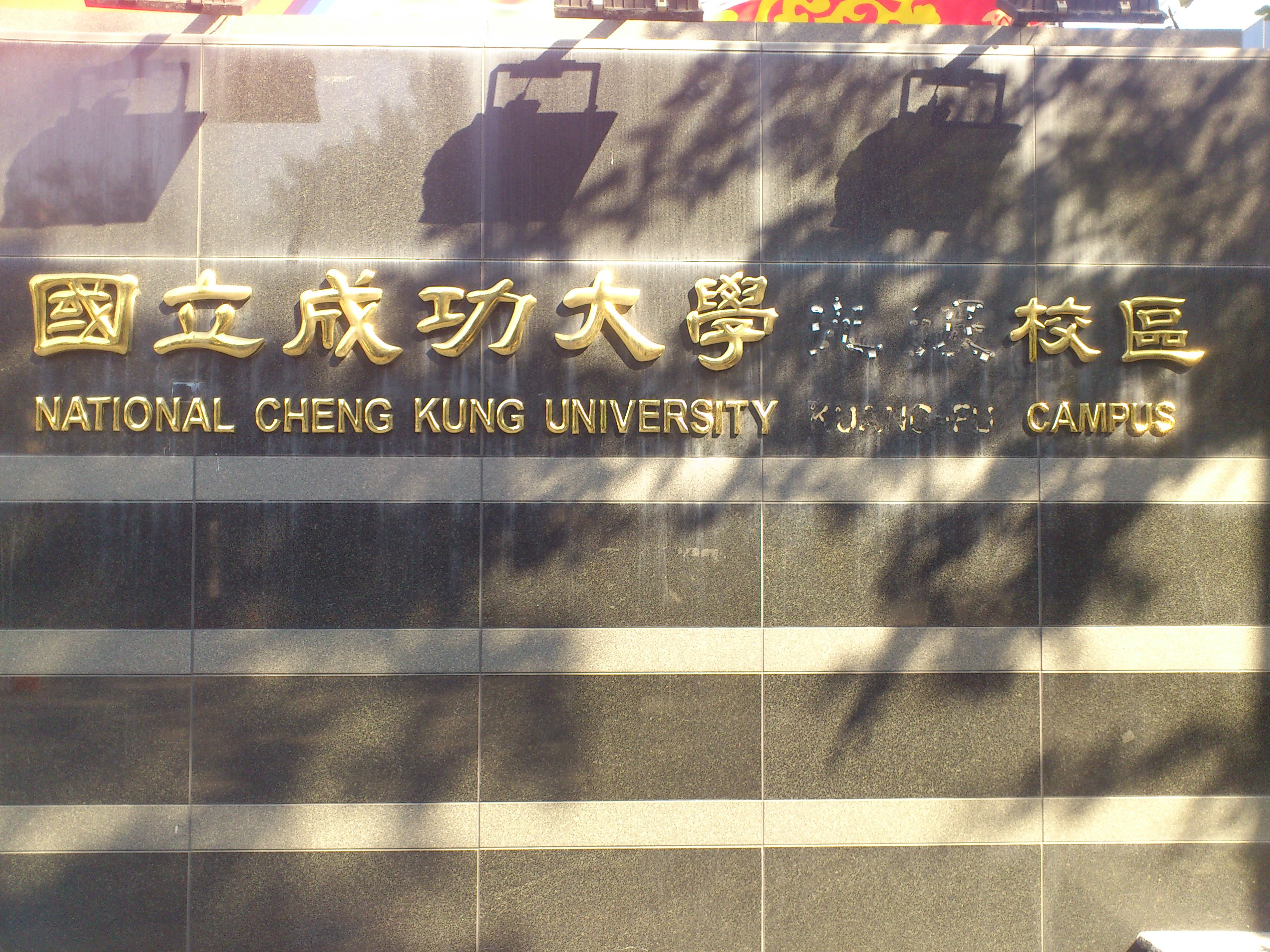 「光復」二字中英文遭拆除之國立成功大學光復校區正門。